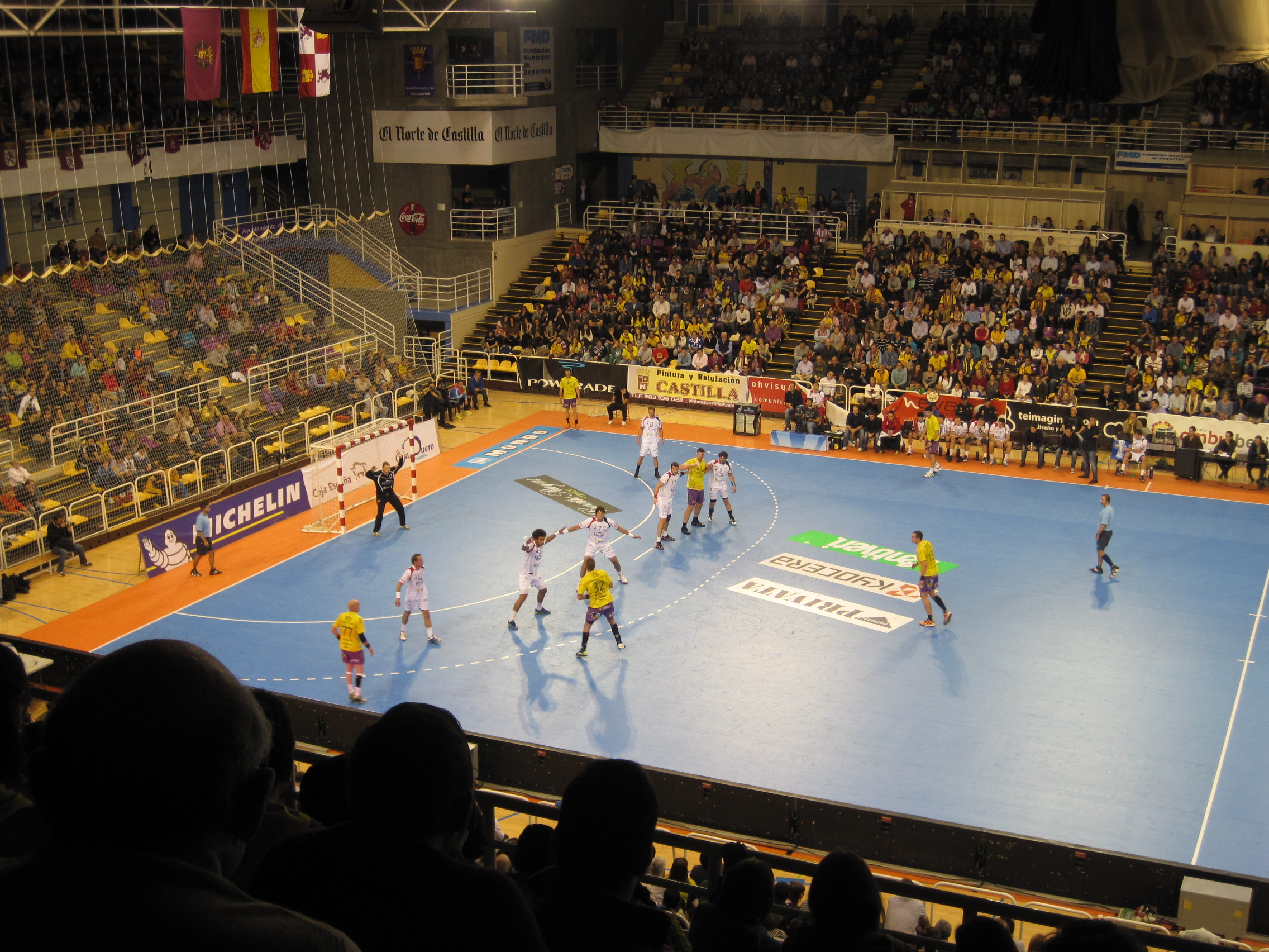 Momento del partido Balonmano Valladolid-Ademar León, correspondiente a la temporada 2011/12 de la liga Asobal.